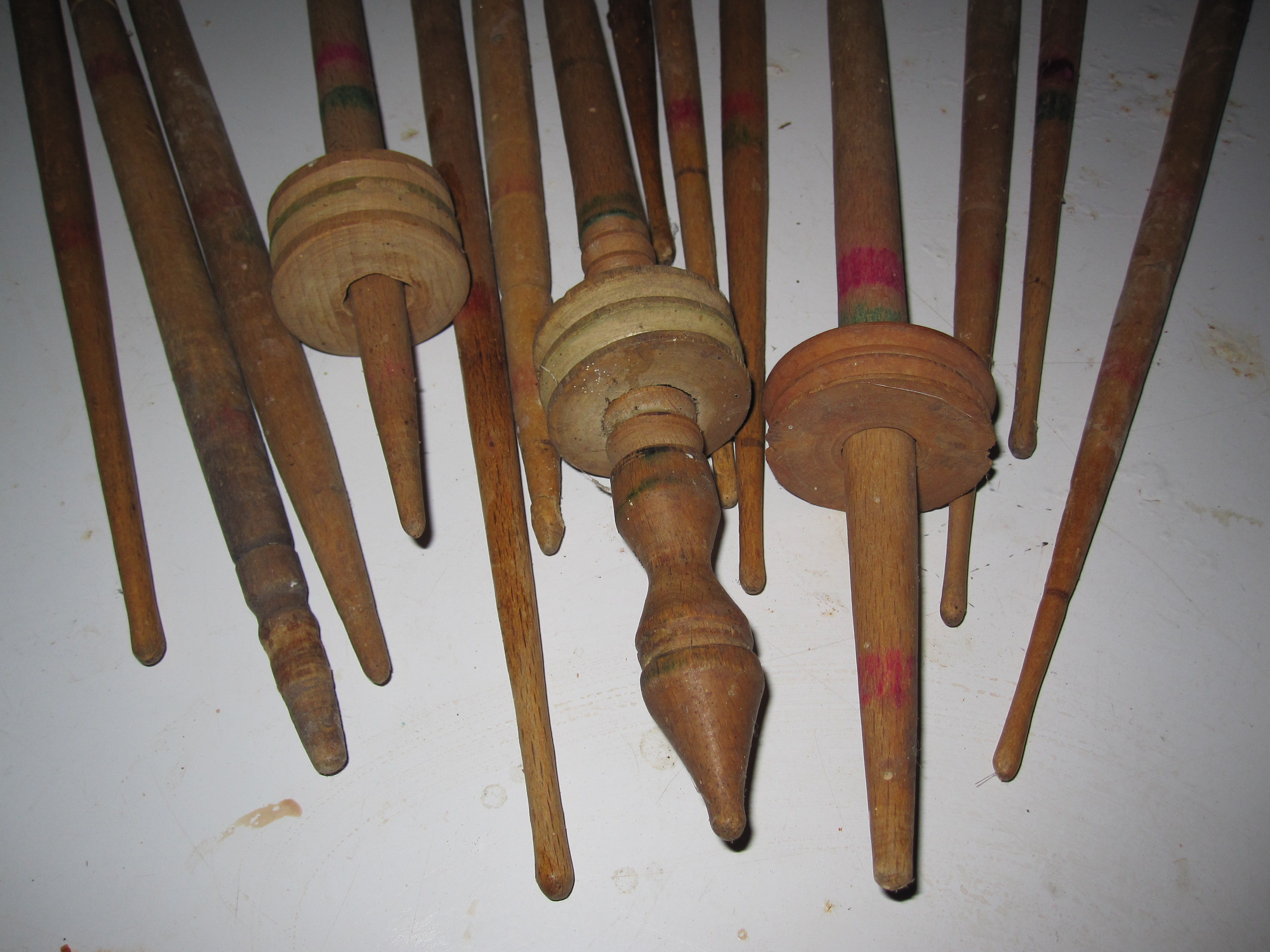 Вретено - алатка за предење (постапката од пласт волна да се направи конец)